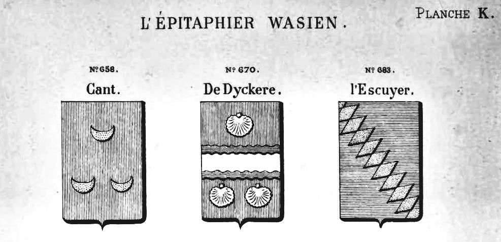 Armoriaal der Waase Nobele en Edele Familiën, begraven in de Wase Kerken, / Cercle archéologique du pays de Waes